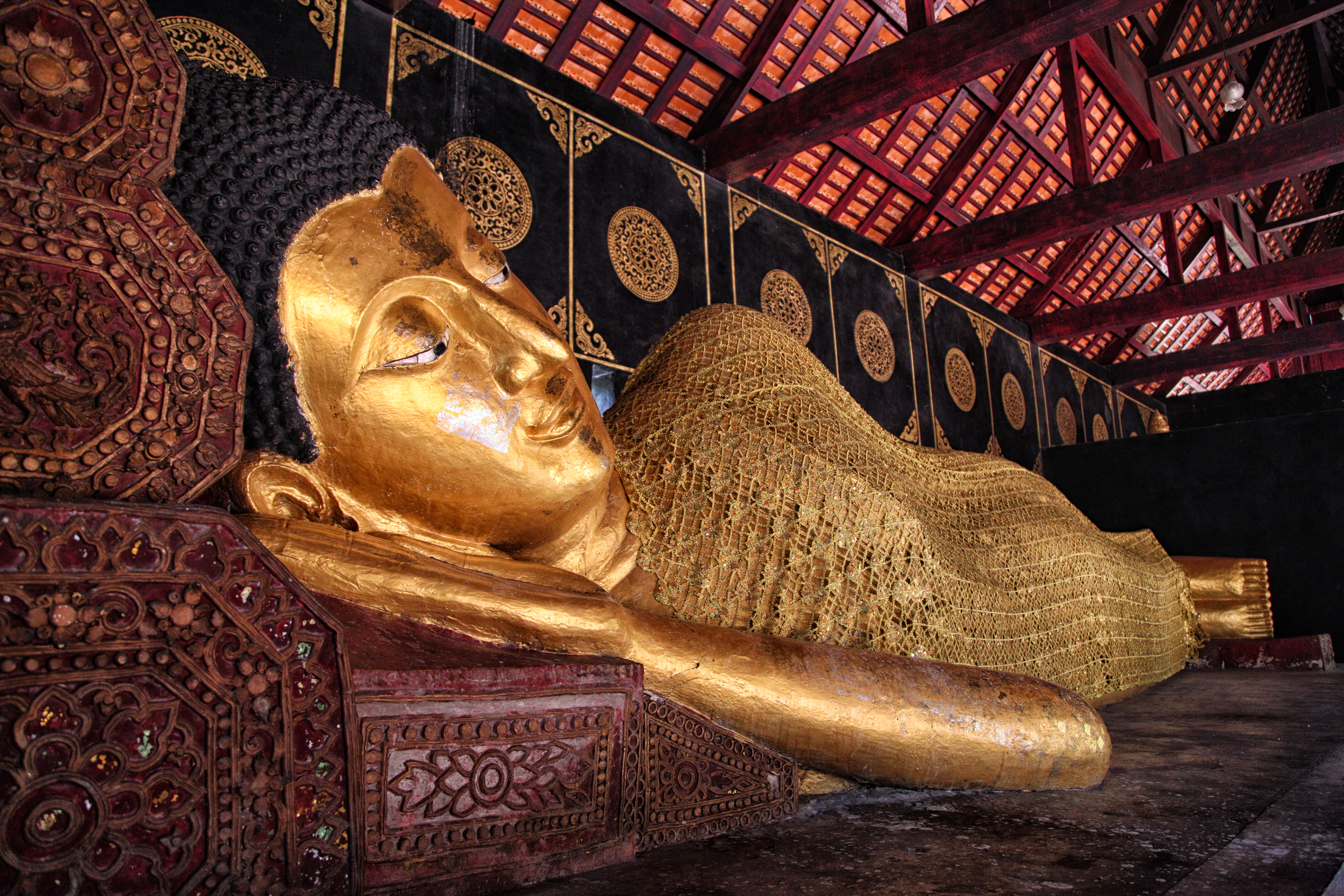 วัดเจดีย์หลวง